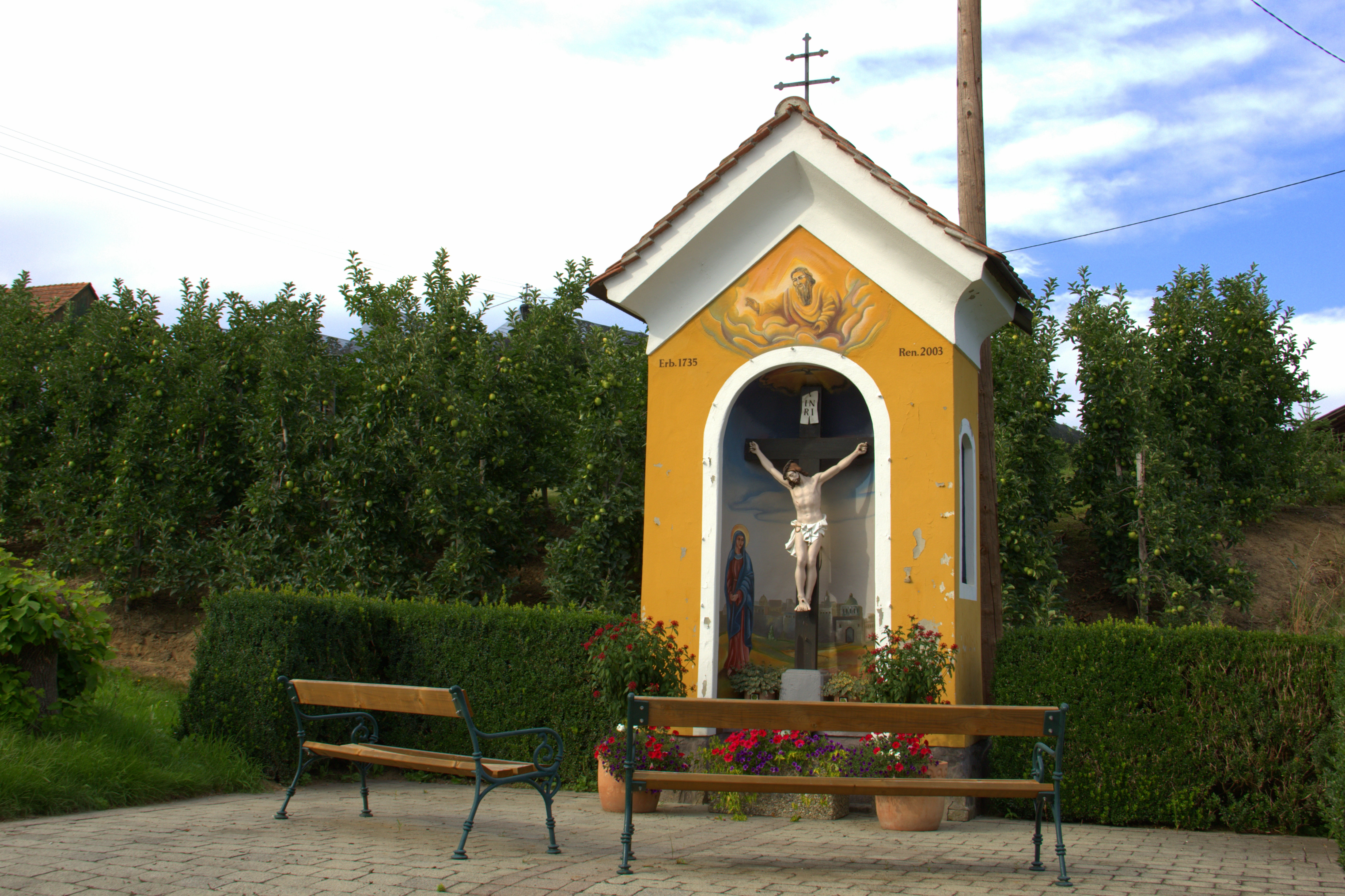 Bildstock